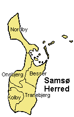 Samsø Herred Holbæk Amt , Denmark. Map by Svend-Erik Christiansen, edited by user:Nico-dk .